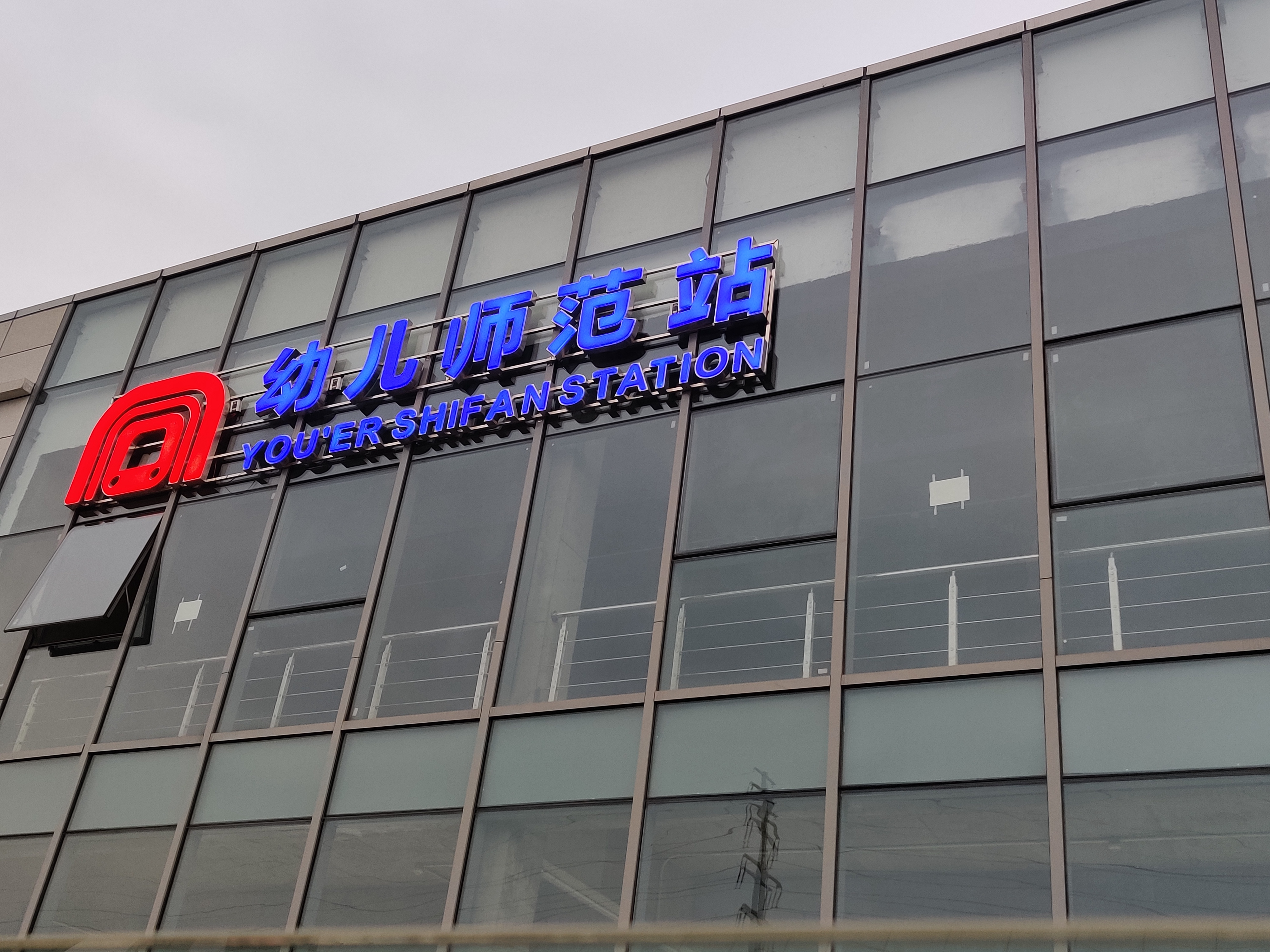 中文（中国大陆）: 合肥轨道交通幼儿师范站外景